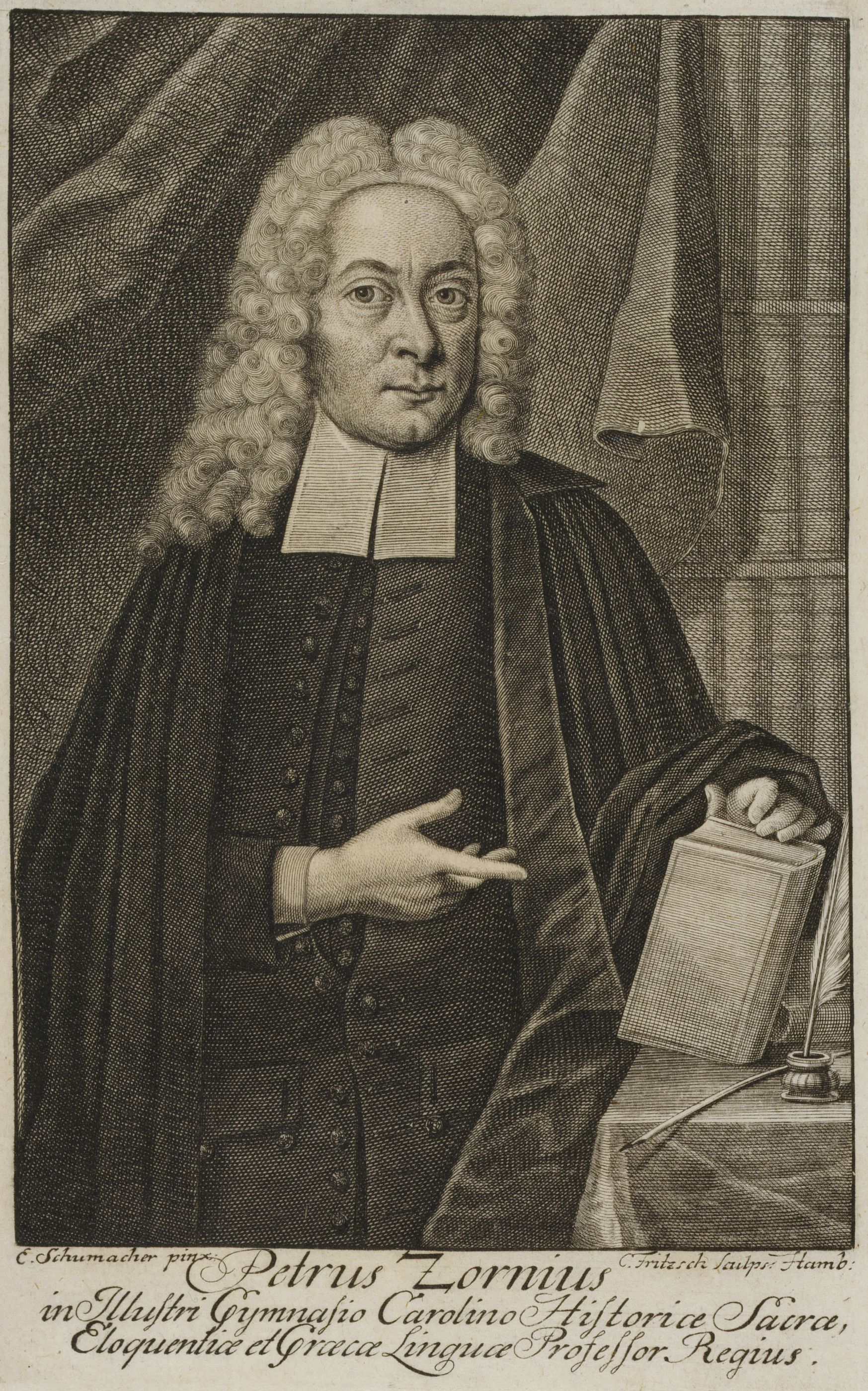 Petrus Zornius in Illustri Gymnasio Carolino Historiae Sacrae, Eloquentiae et Graecae Linguae Professor Regius